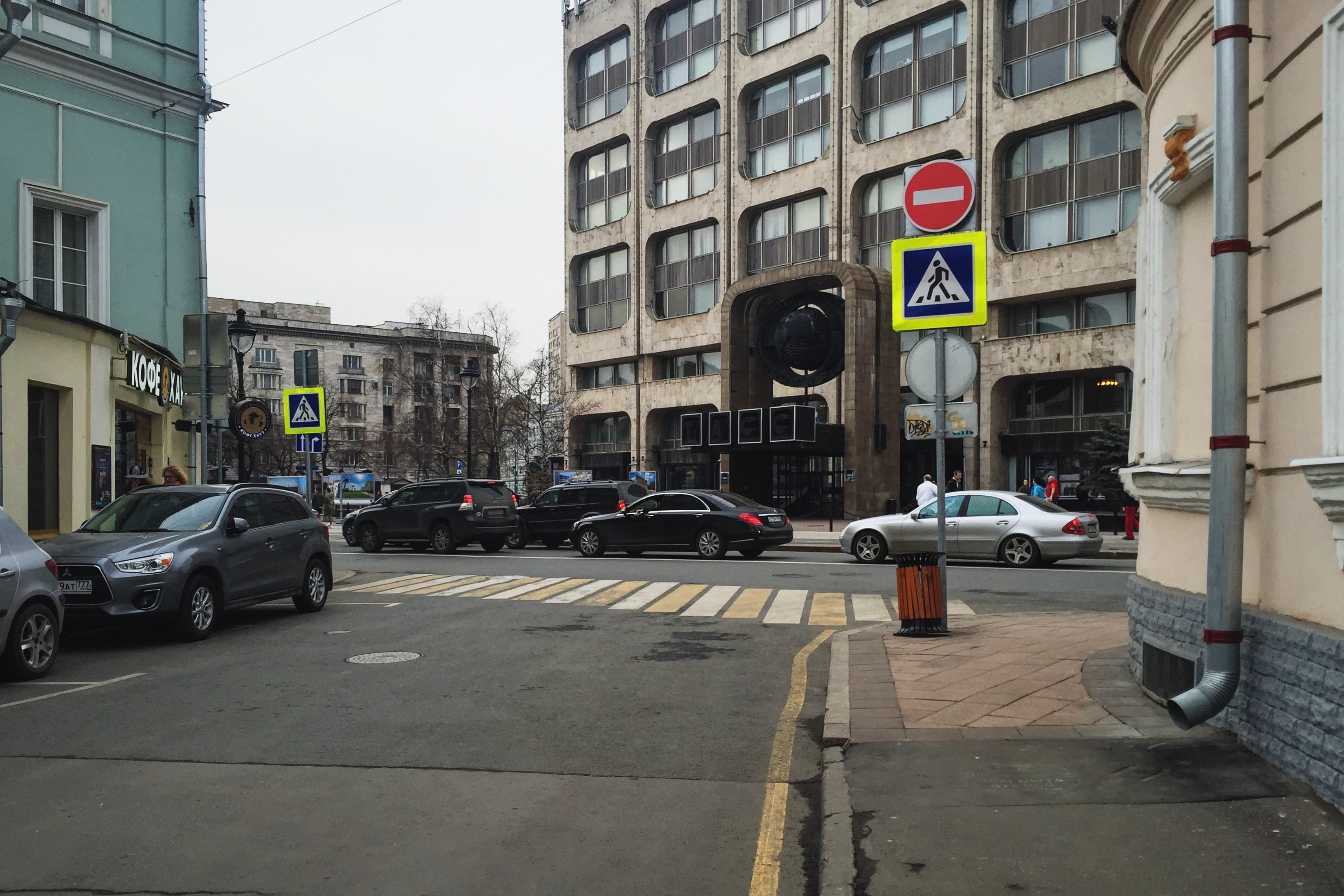 Большая Никитская, вид из Калашного переулка на здание ТАСС.